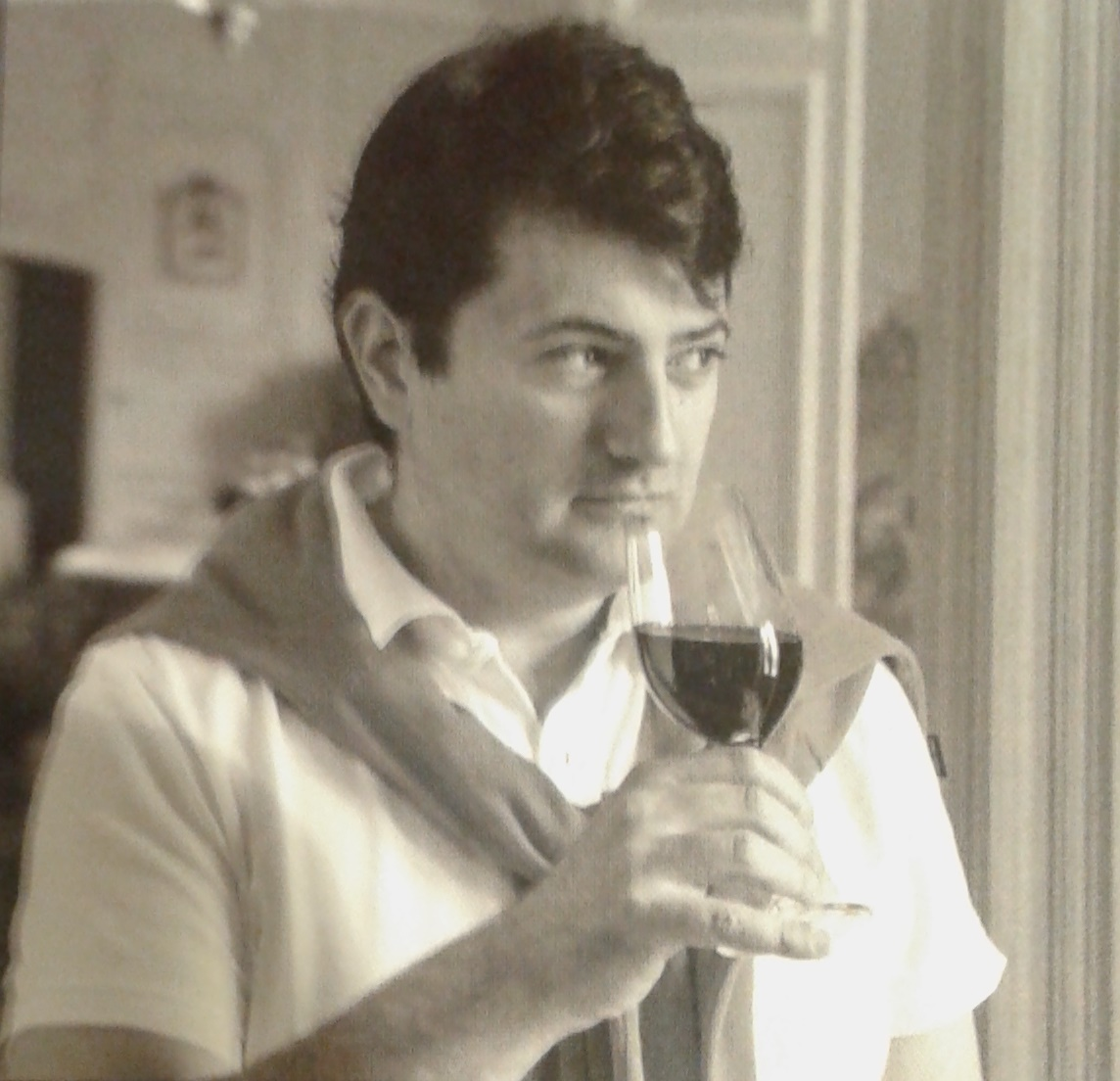 Compositeur et chef d'orchestre Bruno Mantovani